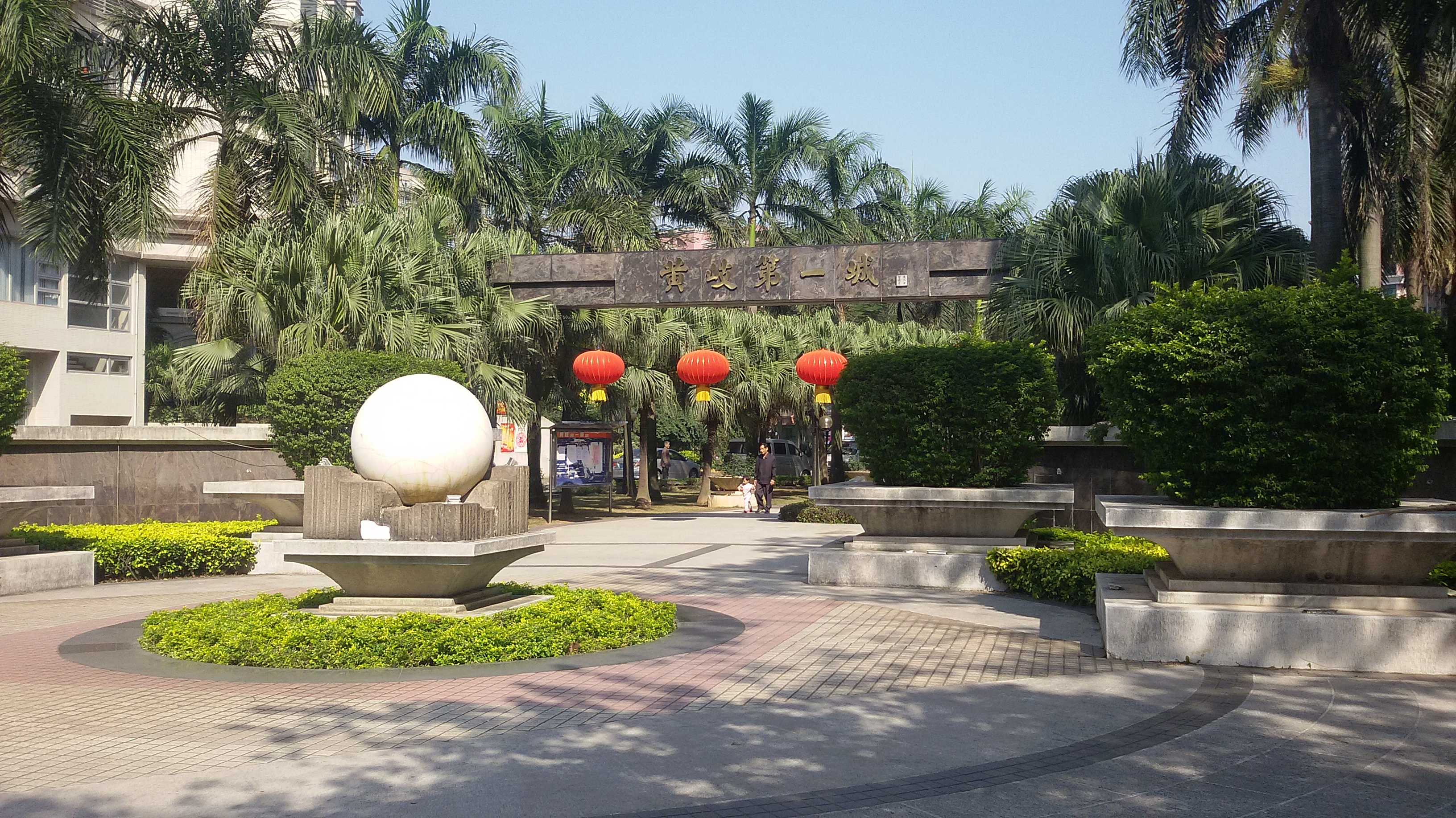 粵語: 黄岐第一城